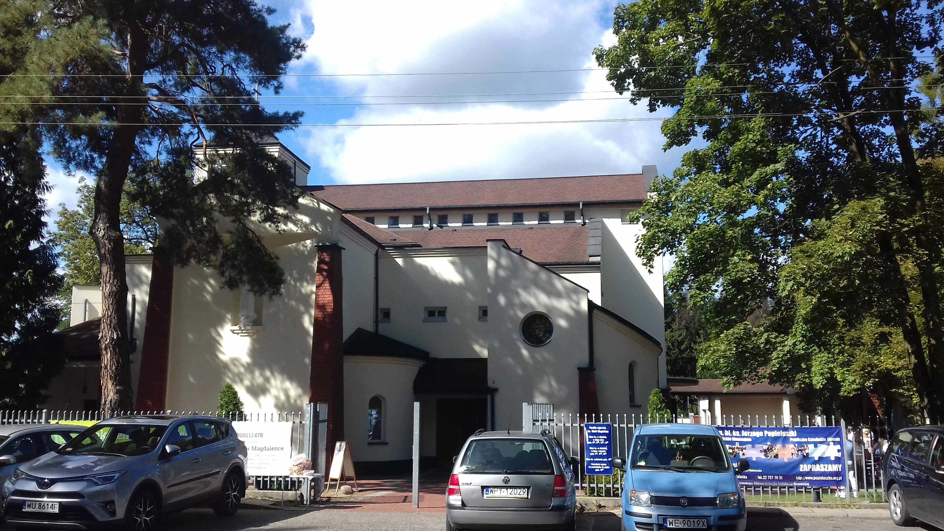 Magdalenka (gm. Lesznowola, pow. Piaseczno) - kościół Św. Marii Magdaleny